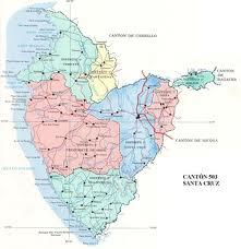 Mapa del Cantón de Santa Cruz, Guanacaste, Costa Rica